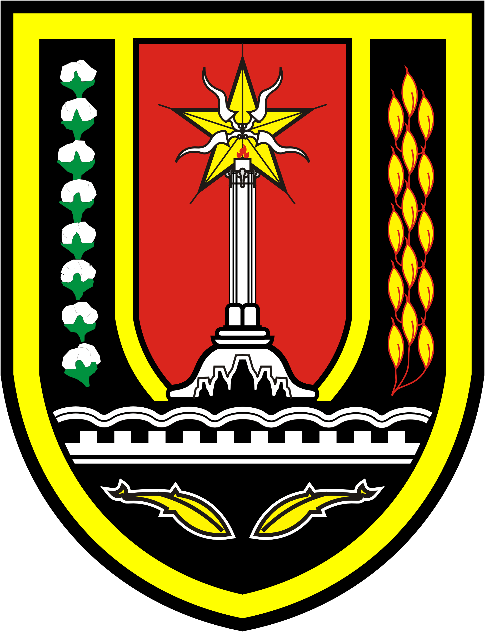 Semarang Kota